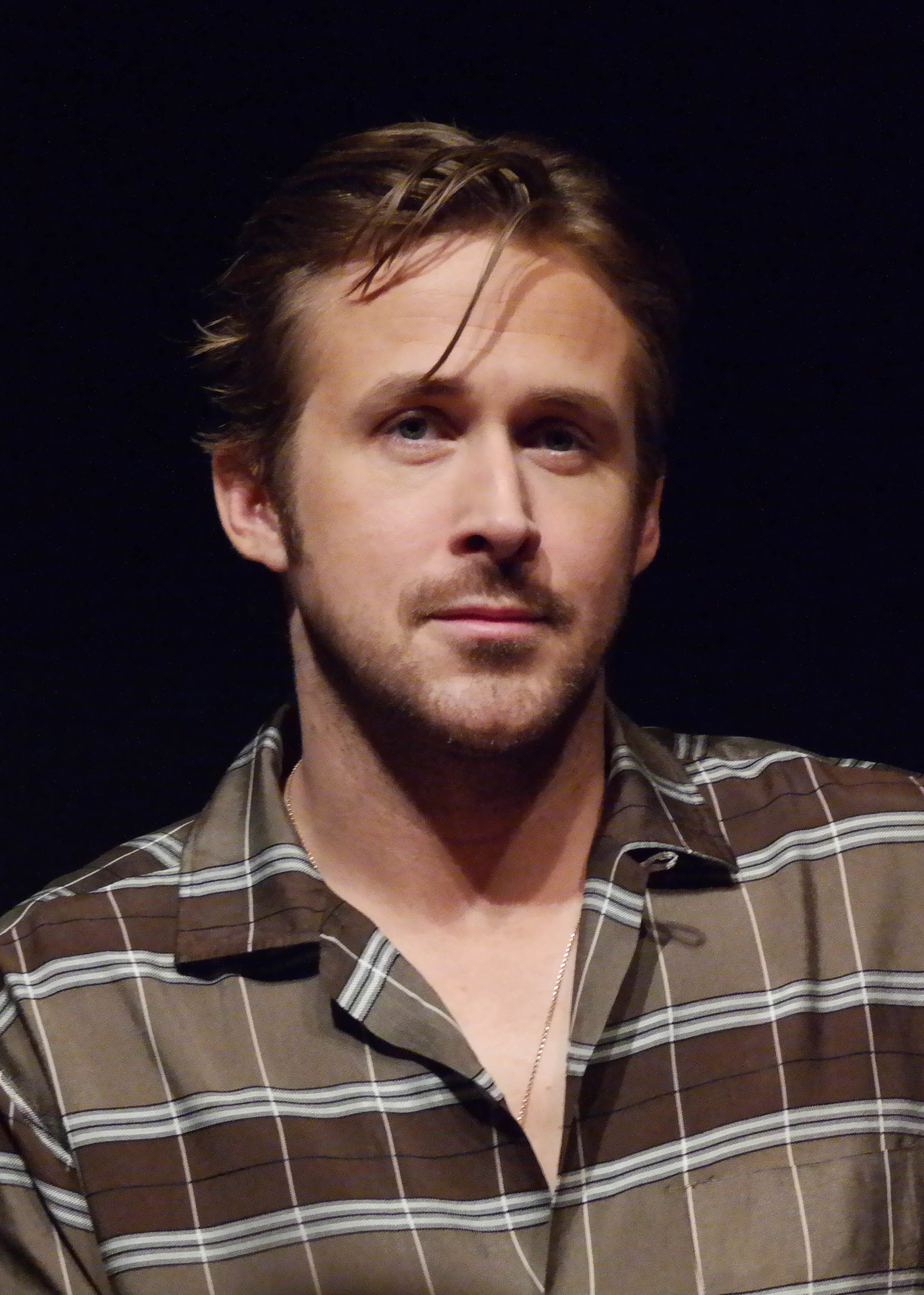 Rencontre avec Ryan Gosling et Reda Kateb pour Lost River